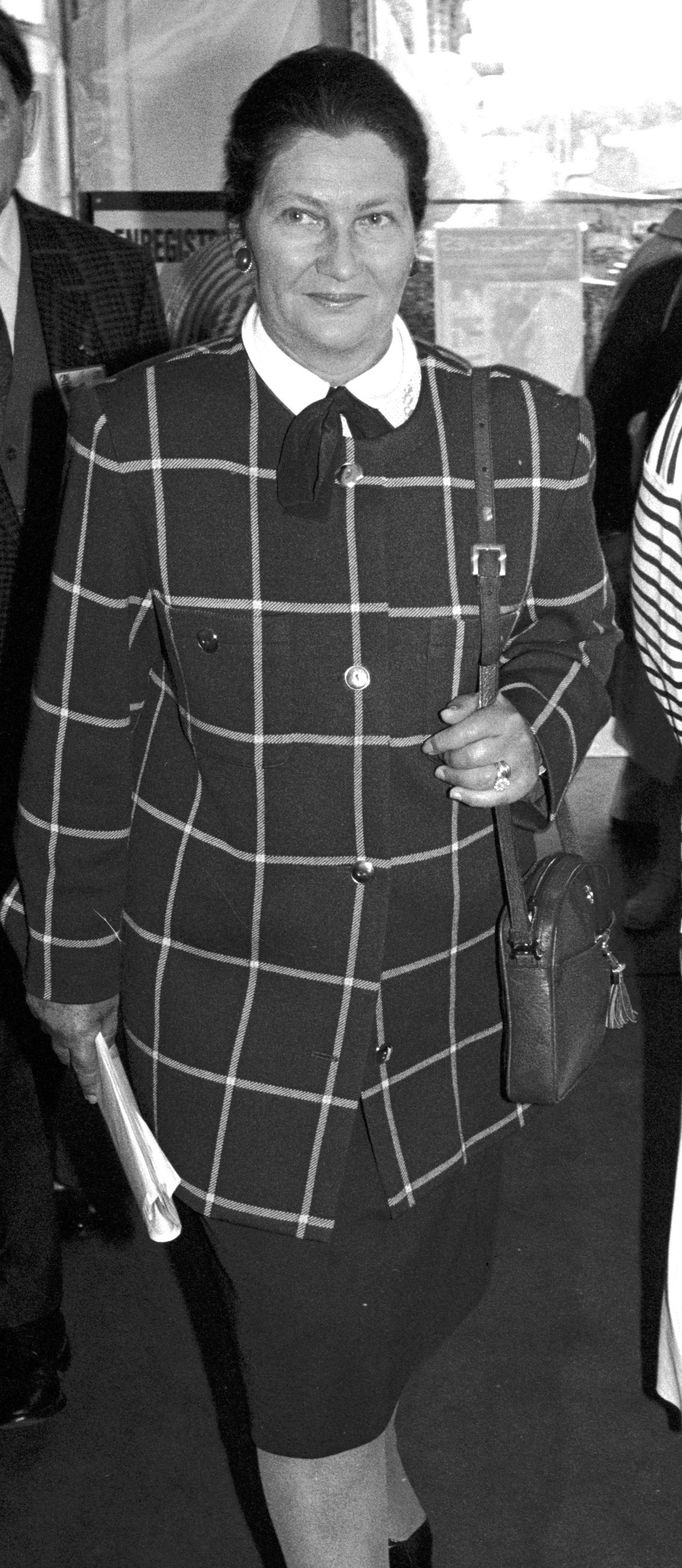 Simone Veil à Deauville (Normandie, France) le 31 mai 1988.